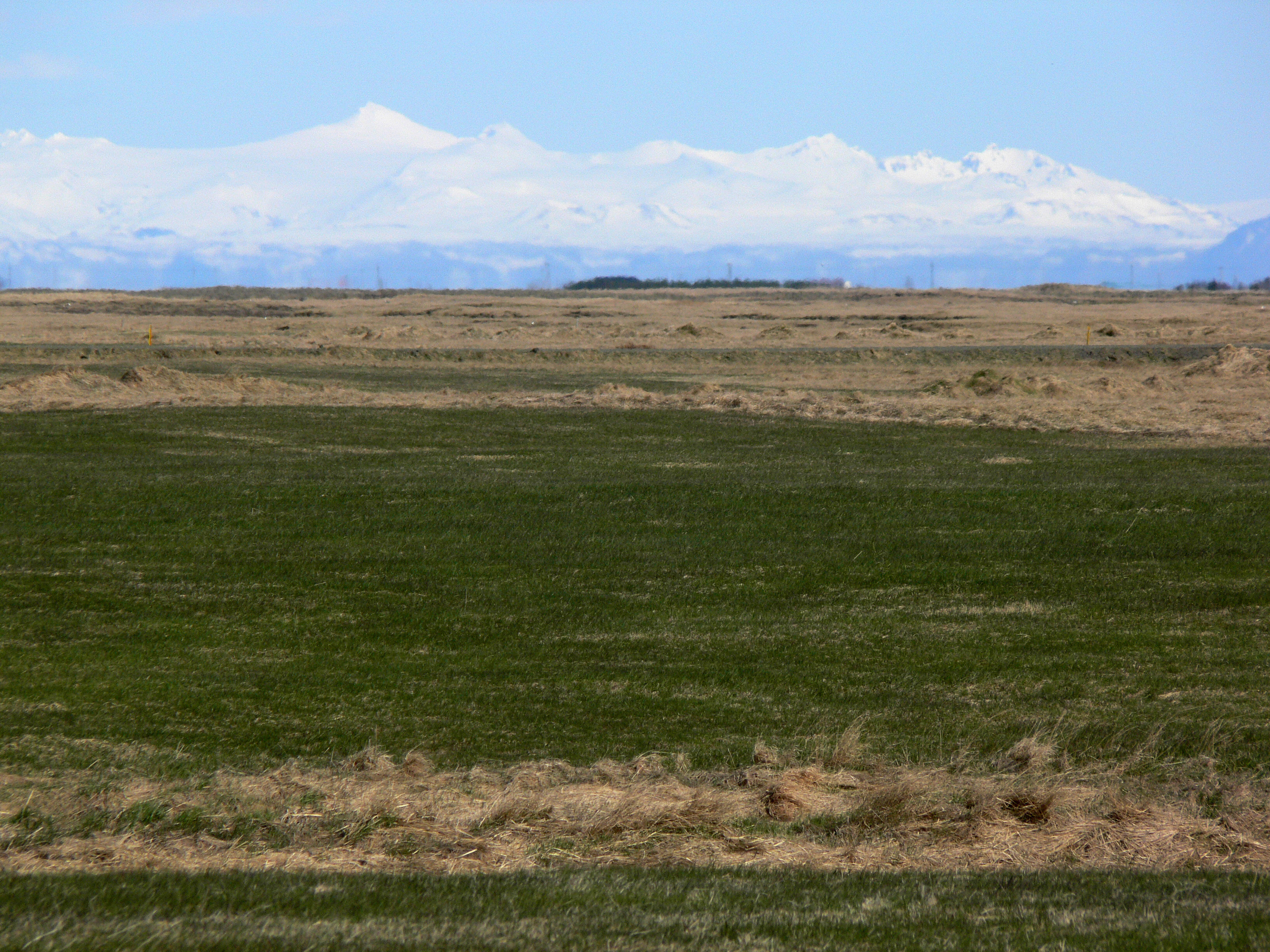 Blick von Kjaldardanes auf den Tindfjallajökull..